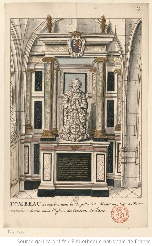 dessins corrigé de relevés fait pour Gaignières, BNF numérisation Gallica.